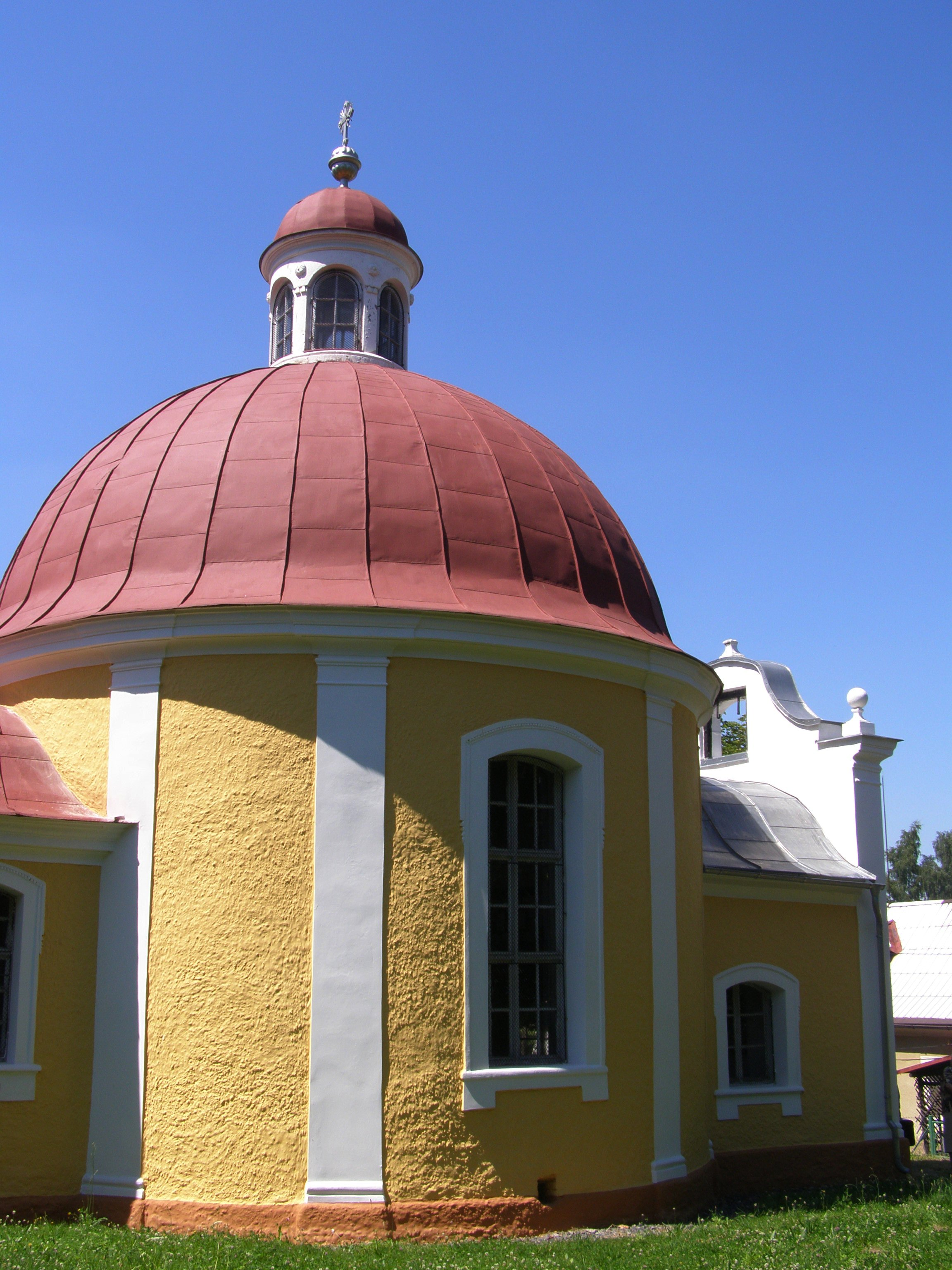 Černousy, kaple sv. Jana Nepomuckého, východní část